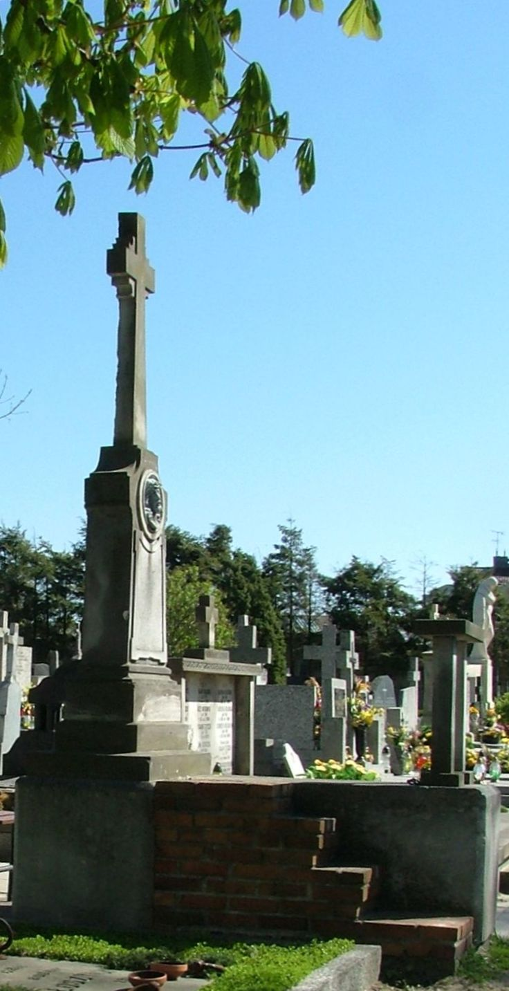 pl, Polska, Warszawa, Mokotów, Cmentarz na Służewie przy ul. Renety, przy terenach plebanii Kościoła św. Katarzyny